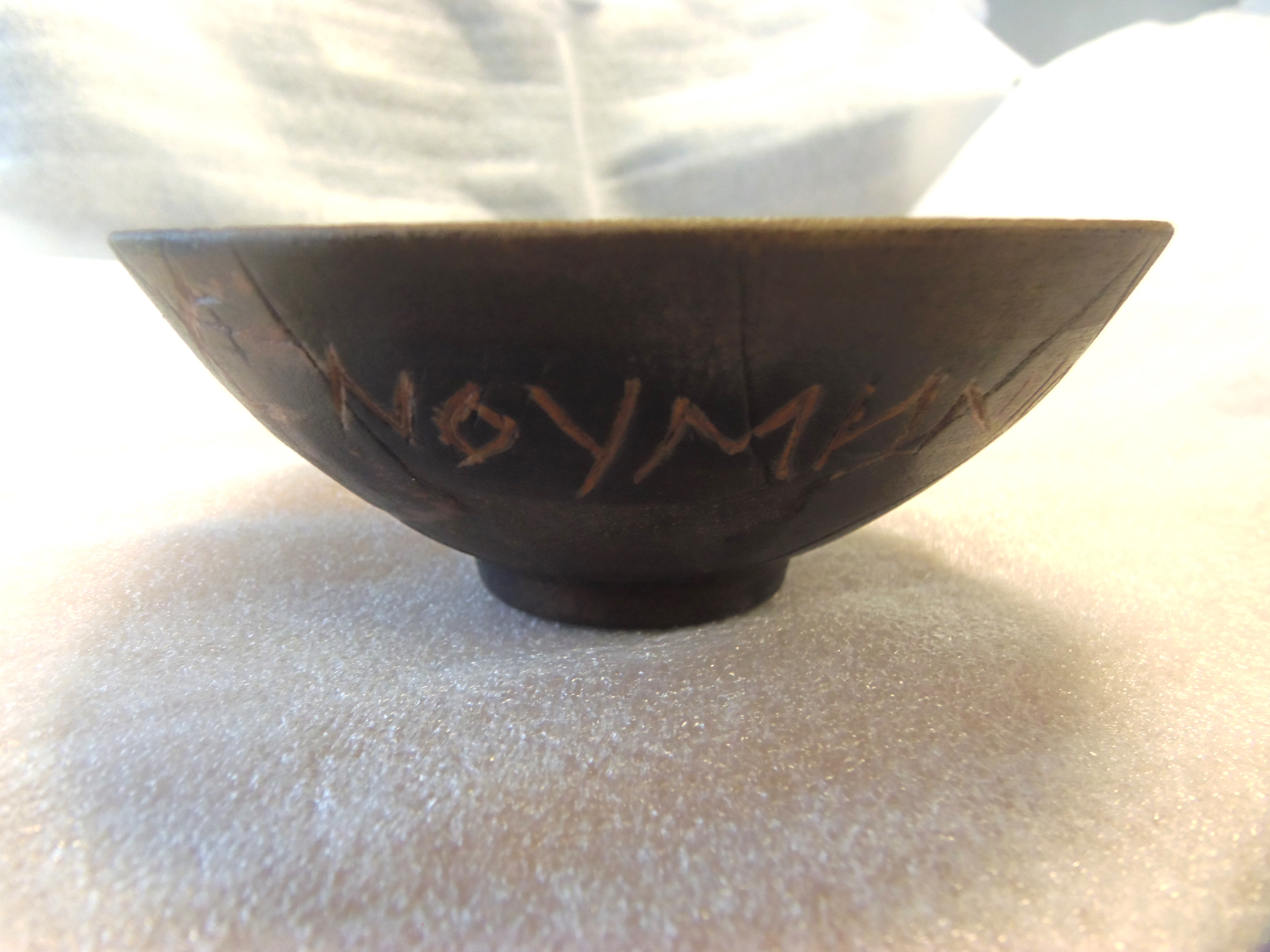 Vue côté du fac-similé de la coupe dite de Klea, fille d'Oulis, portant l'inscription en grec "A Aristée, avec reconnaissance".